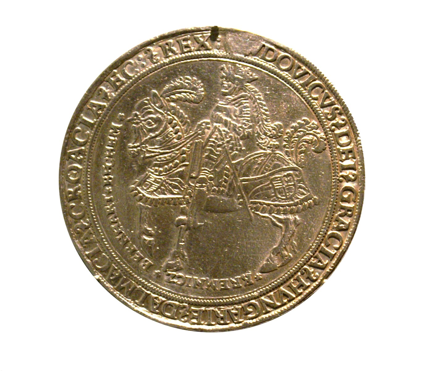 Ungarn, König Ludwig II., 1 1/2 Taler, Kremnitz